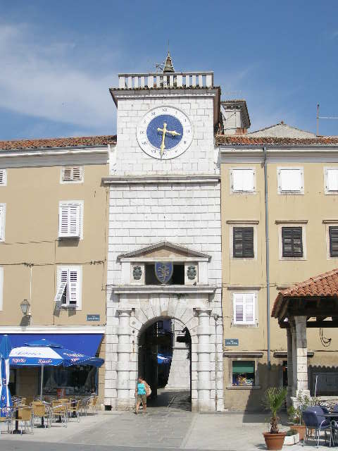 Cres, la torre civica dell'orologio.